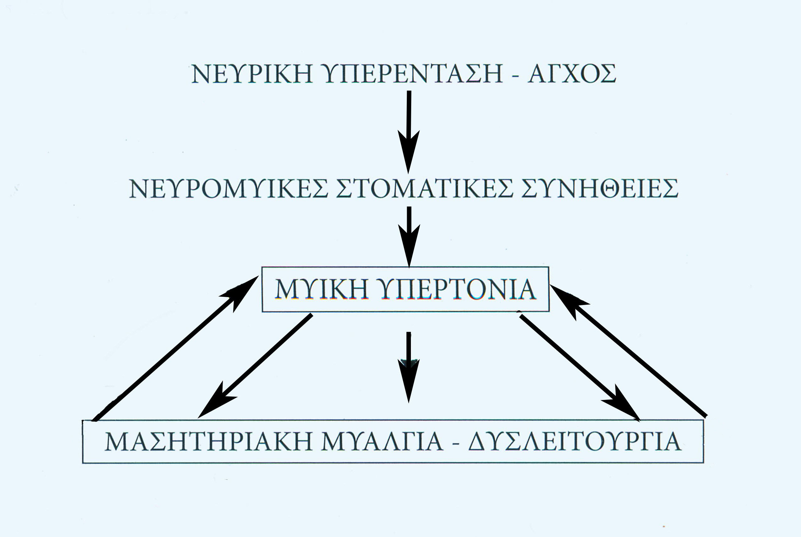 Στο σύνδρομο αυτό, όταν η μυϊκή υπερτονία προκαλέσει μυαλγία ή/και δυσλειτουργικά συμπτώματα, τότε δημιουργείται φαύλος κύκλος, κατά τον οποίο ο πόνος επιτείνει αντανακλαστικά την υπερτονία, που αυξάνει τον πόνο κ.ο.κ.